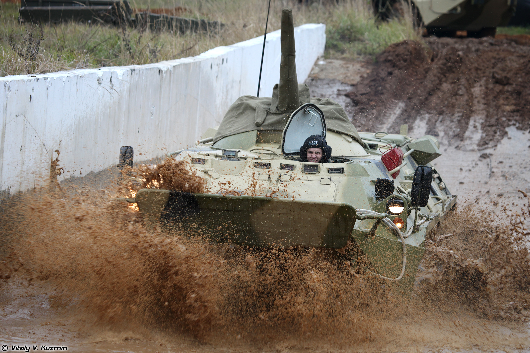 БТР-80 (BTR-80)